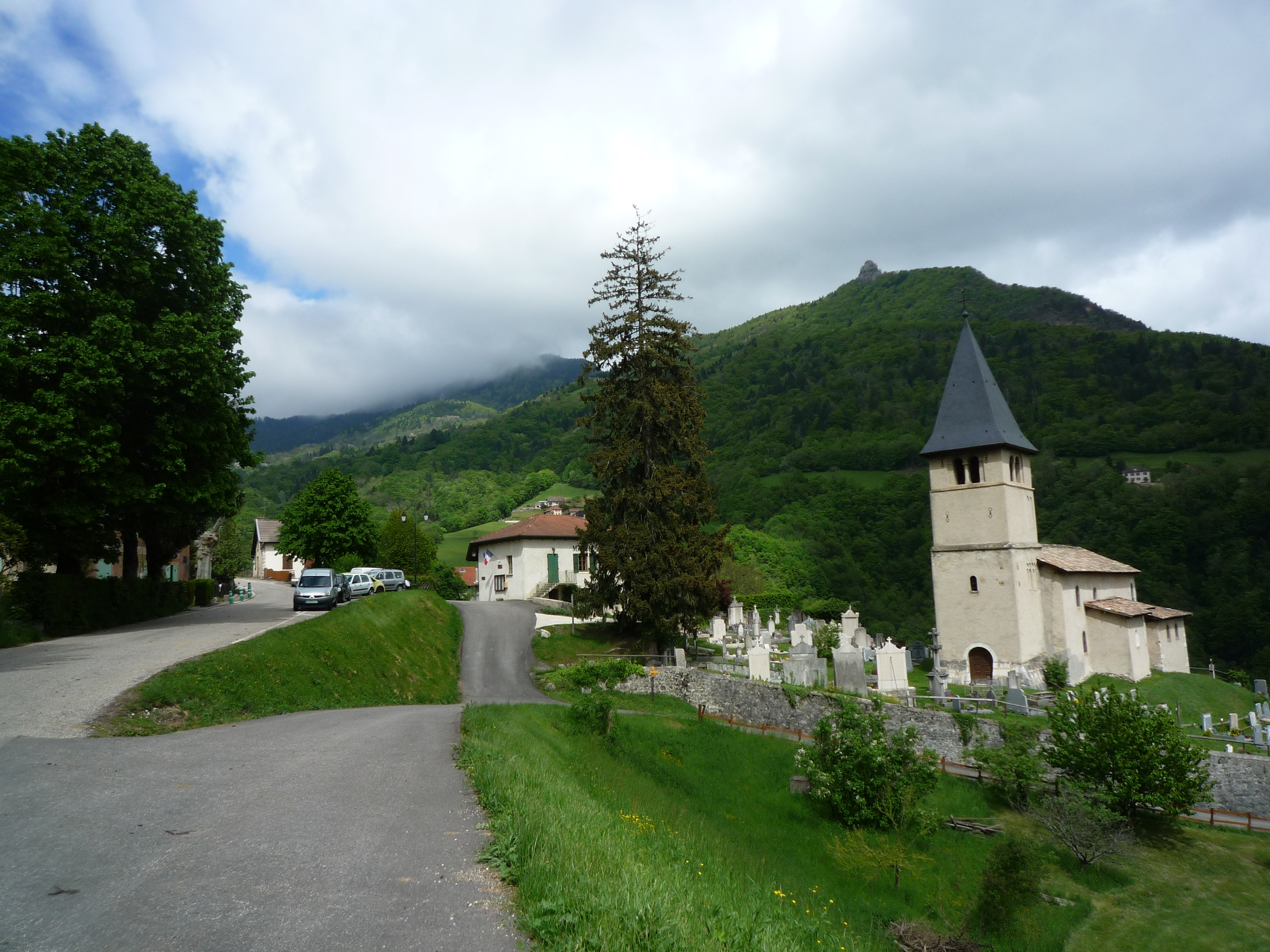 Le village de Proveysieux